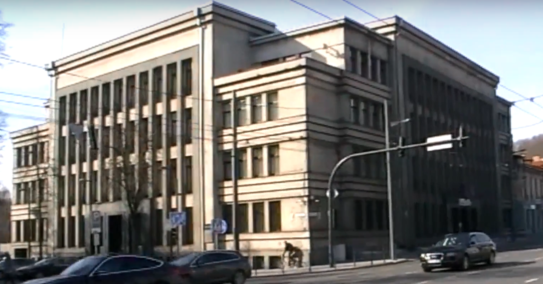 Kauno apskrities vyriausiasis policijos komisariatas